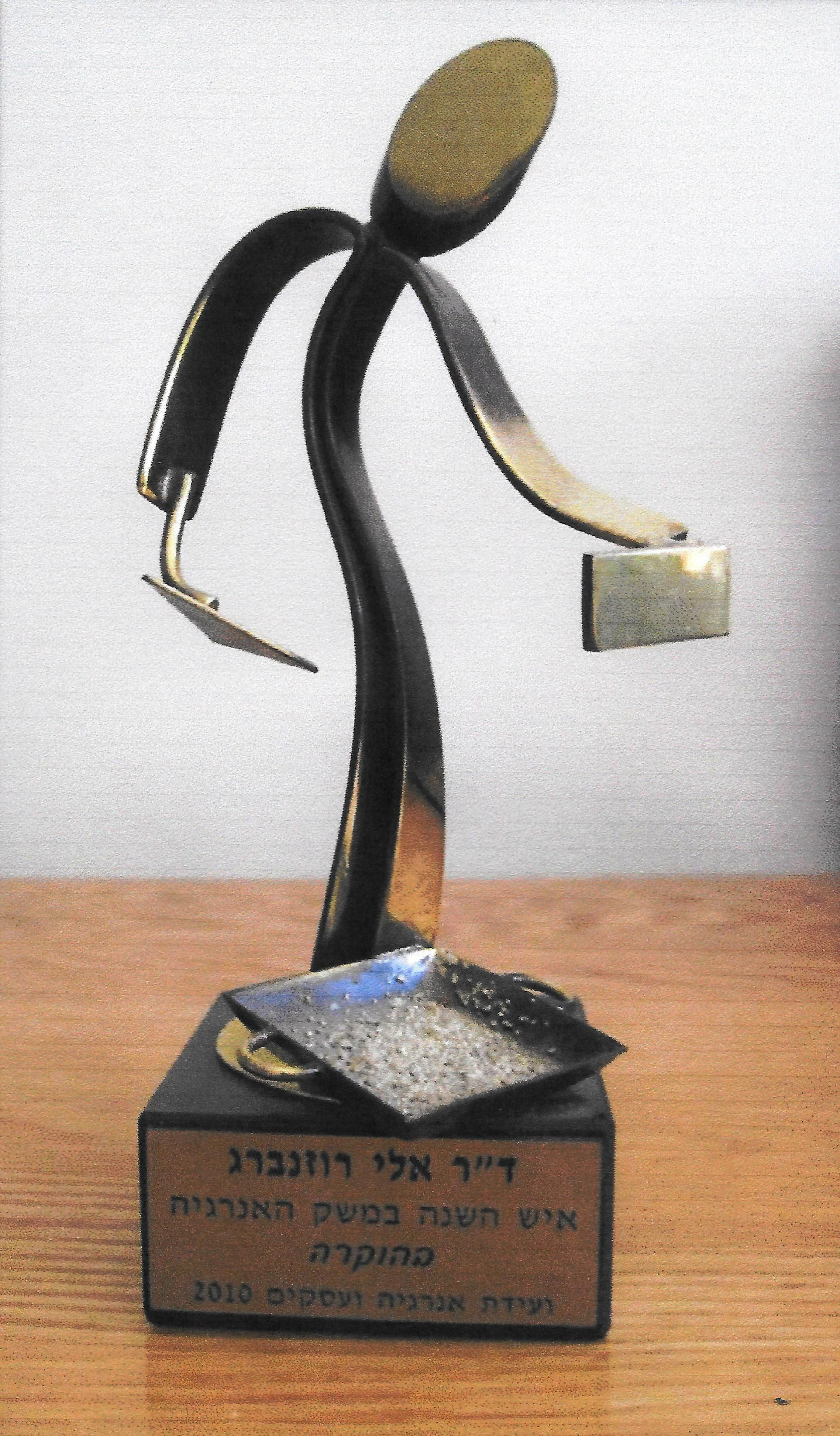 פרס איש השנה באנרגיה שנת 2010 שניתן לאלי רוזנברג גאולוג ויזם ויועץ בתחום קידוחי גז מסחריים בישראל